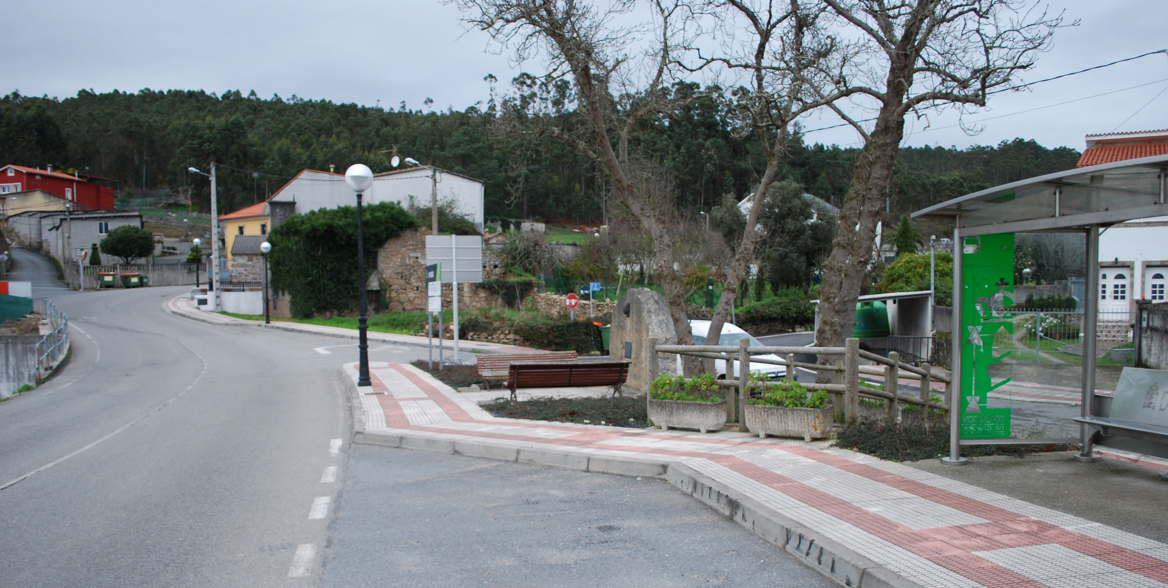 Vista de Uxes acceso Morás Areixo ACoruña Galiza Spain